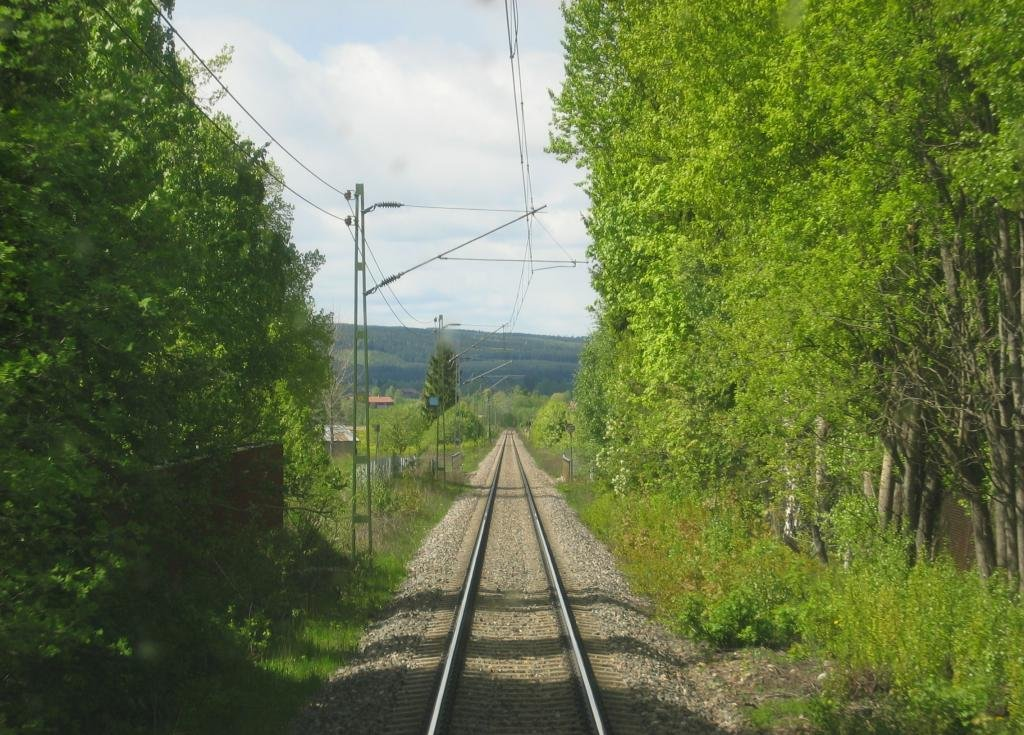 Dalabanan, fotograferat mellan Krylbo och Borlänge